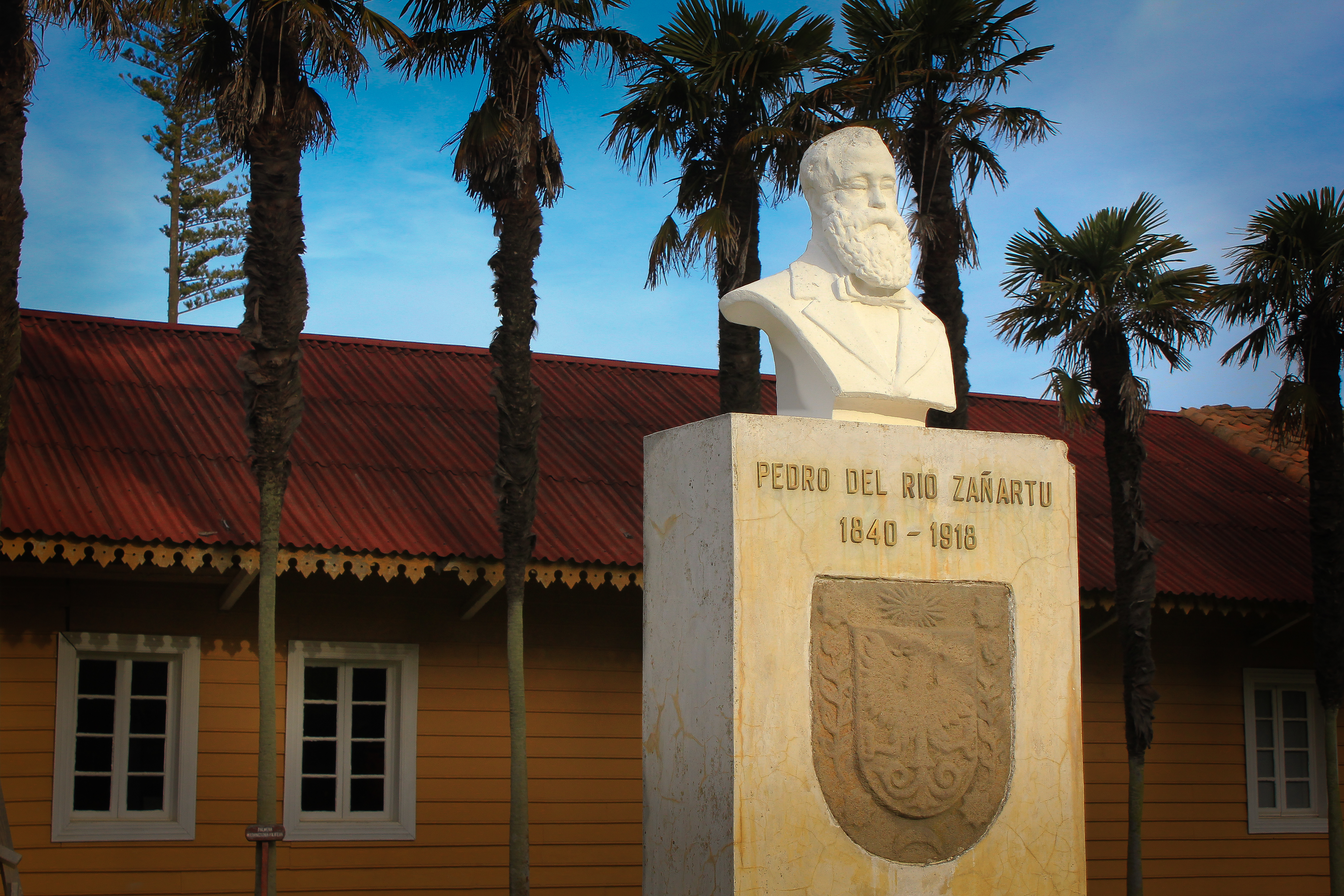 Casas patronales y Parque Fundo Hualpén This is a photo of a national monument in Chile: 650